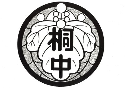 桐ヶ丘中学校の校章